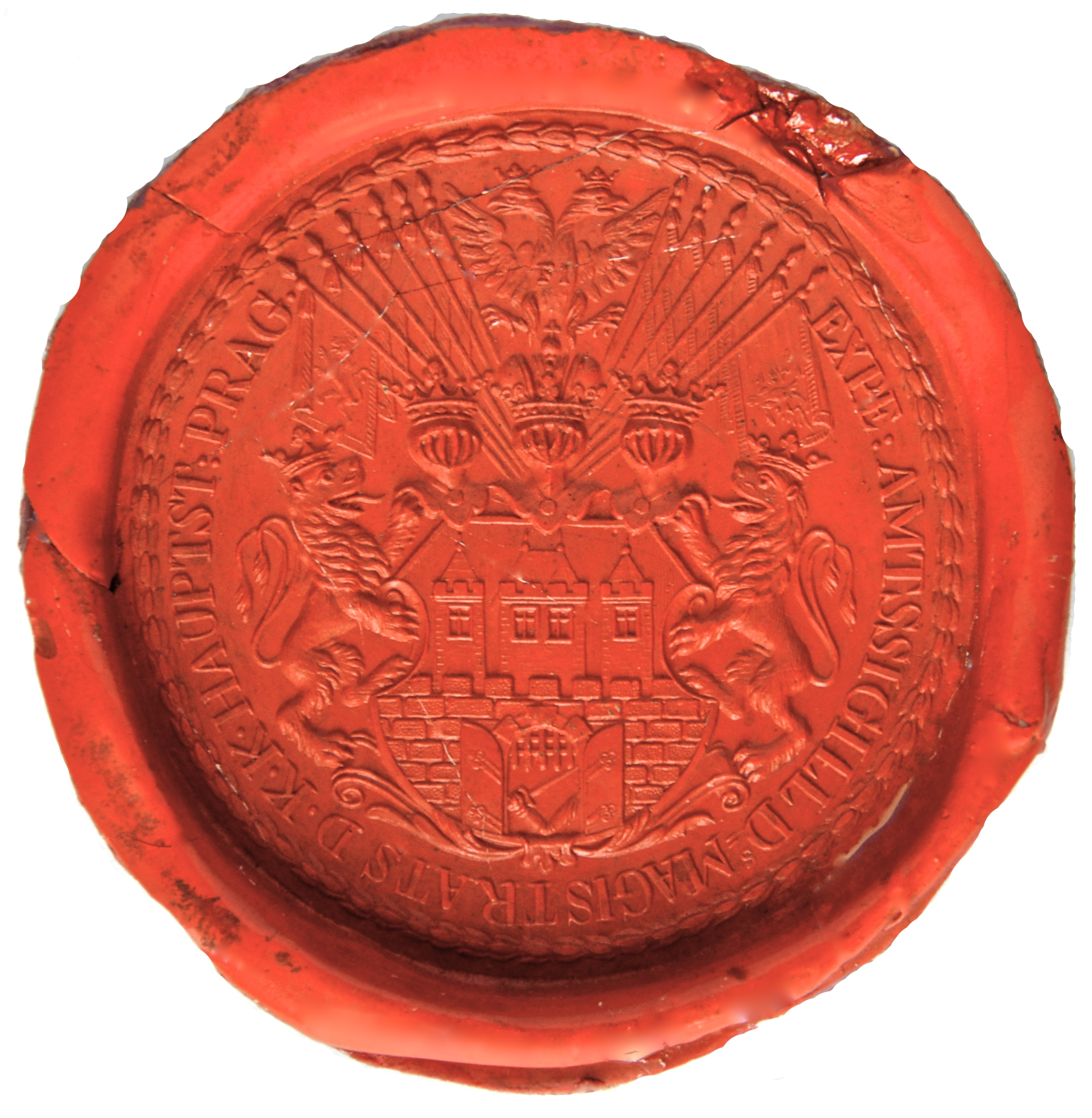 Úřední pečeť - K.K. hlavní město Praha; ≈ 1850